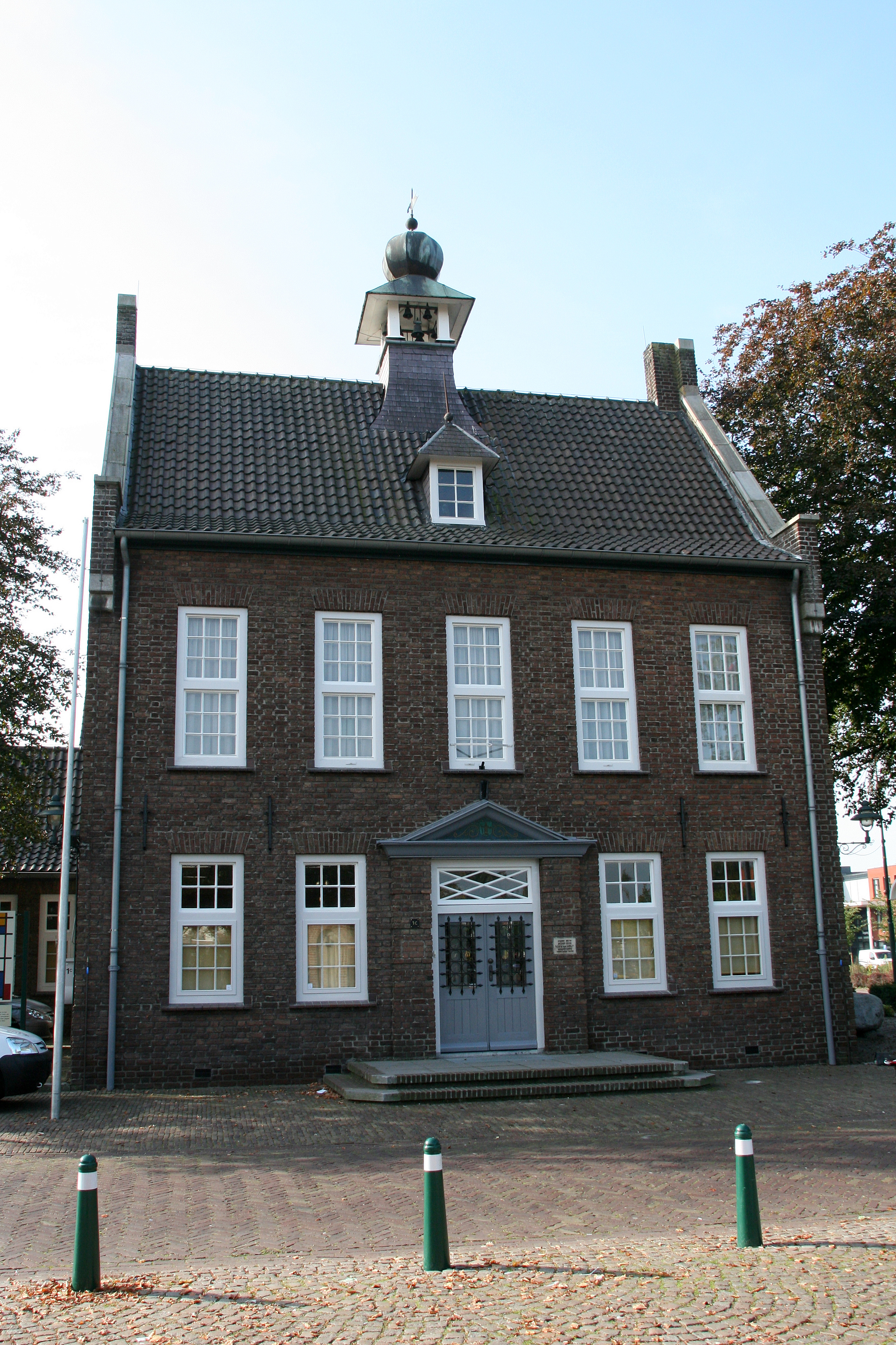 Het voormalig raadhuis werd in 1938 in traditionele stijl gebouwd naar plannen van C. Roffelsen. Bij de herindeling in 1994 is Nistelrode bij de gemeente Bernheze gekomen. Hierbij verloor het pand grotendeels zijn eigenlijke functie, het is nu nog in gebruik als gemeentesecretarie en kantoorpand.